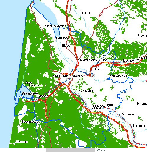 Carte du département Gironde Légende